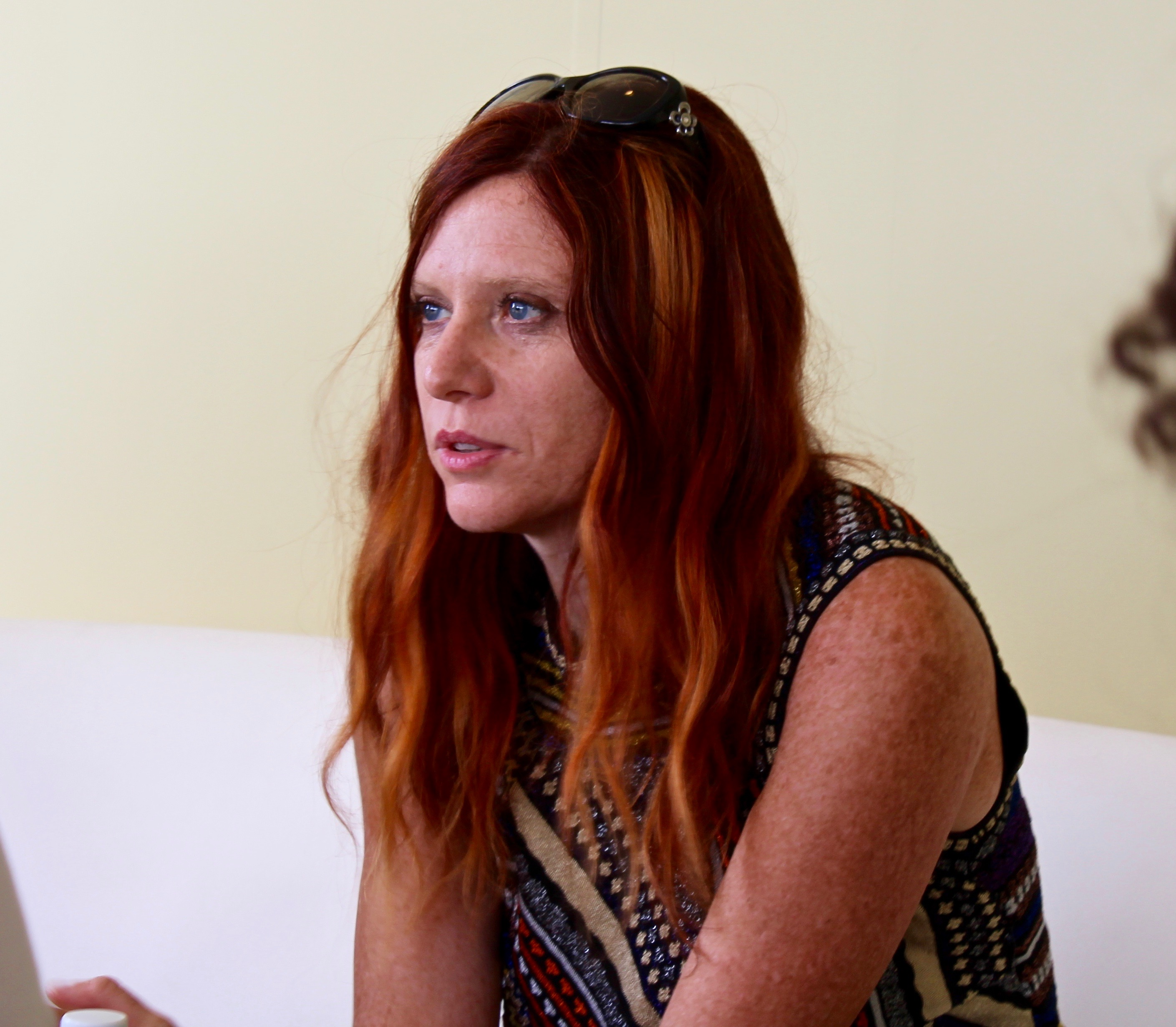 La regista Susanna Nicchiarelli al Festival del Cinema di Venezia 2017